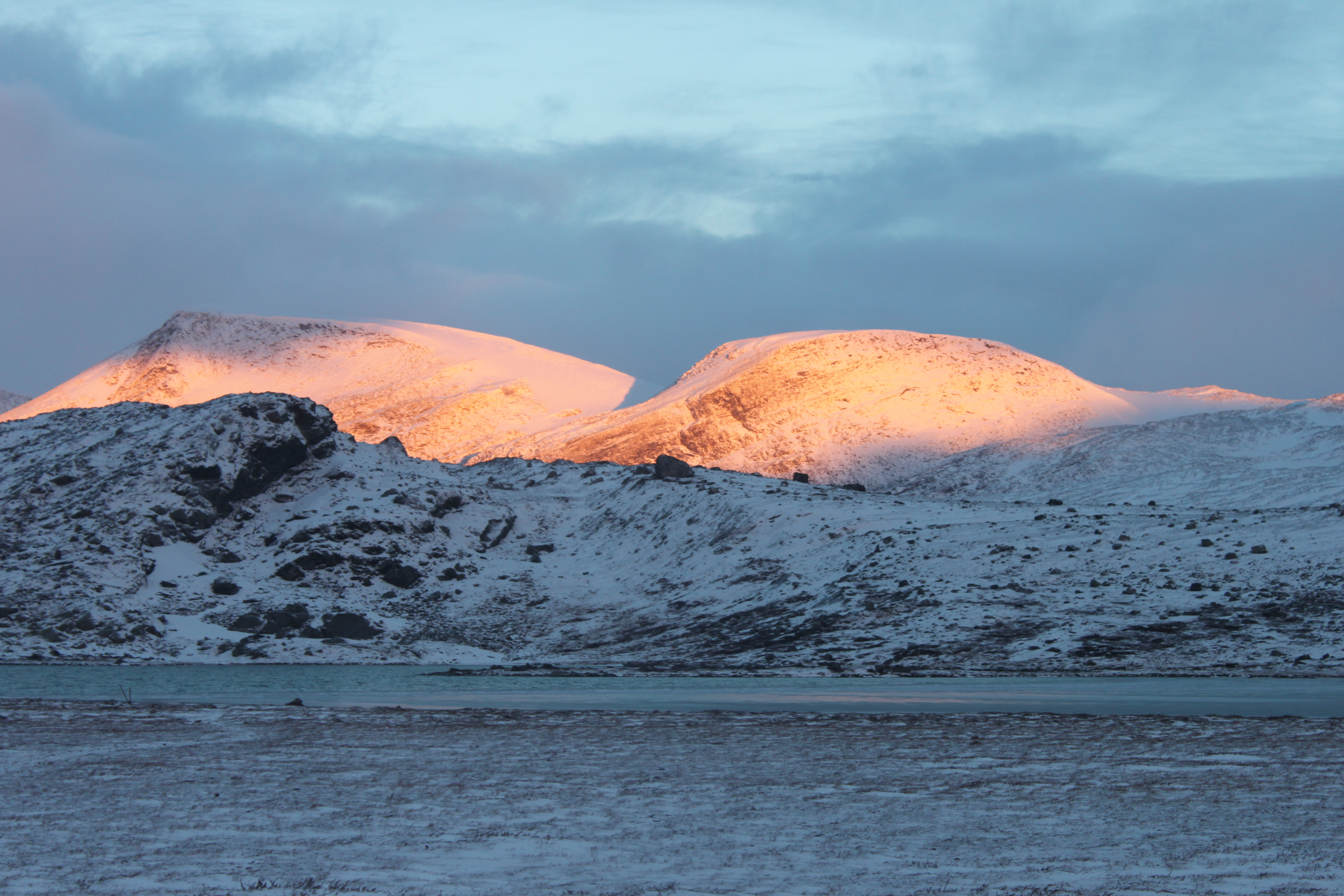 Morgenlys over Storskrymten, Dovrefjell.